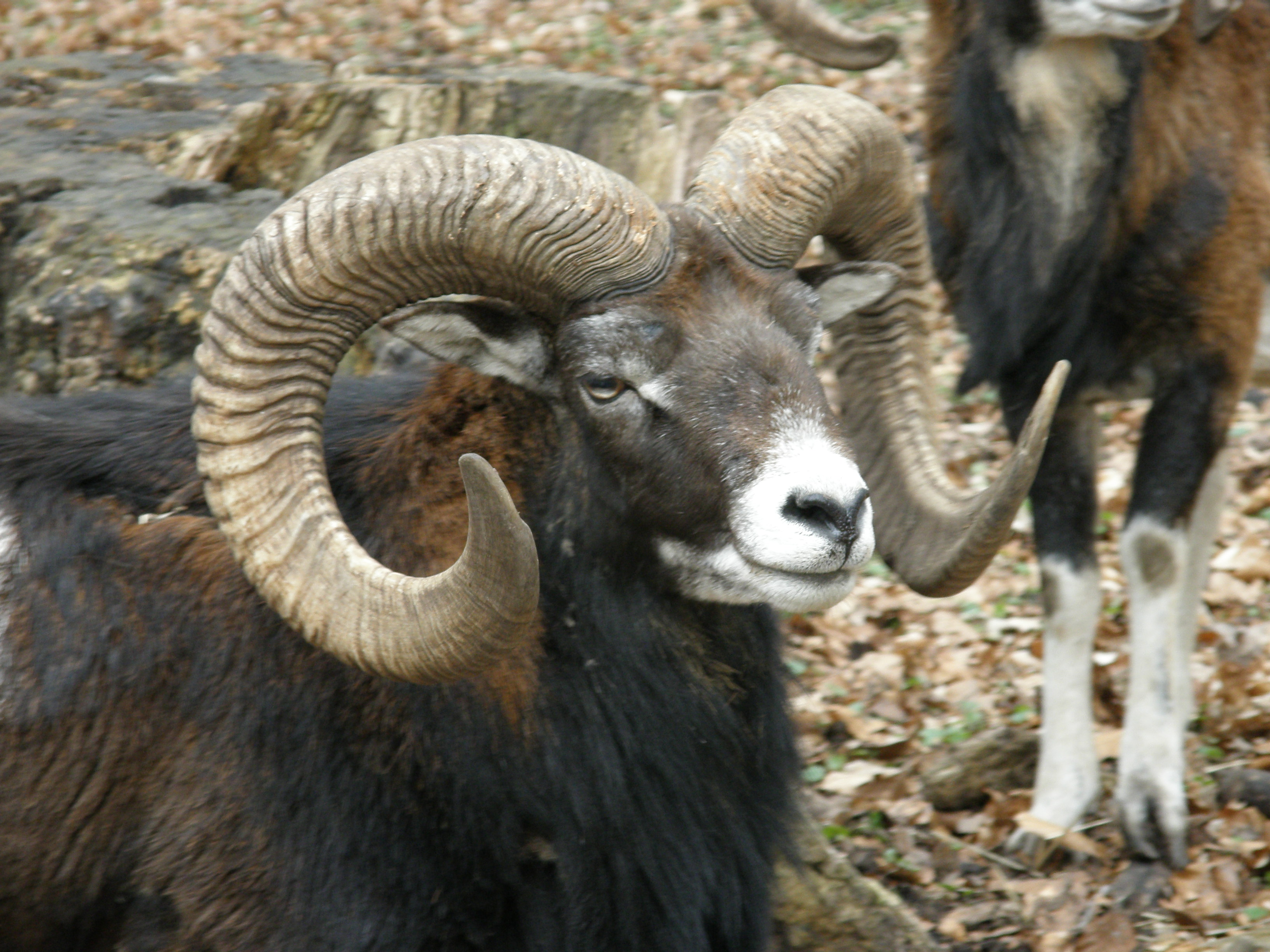 Muffelwild (Ovis ammon musimon) in einem Wald bei Kiel